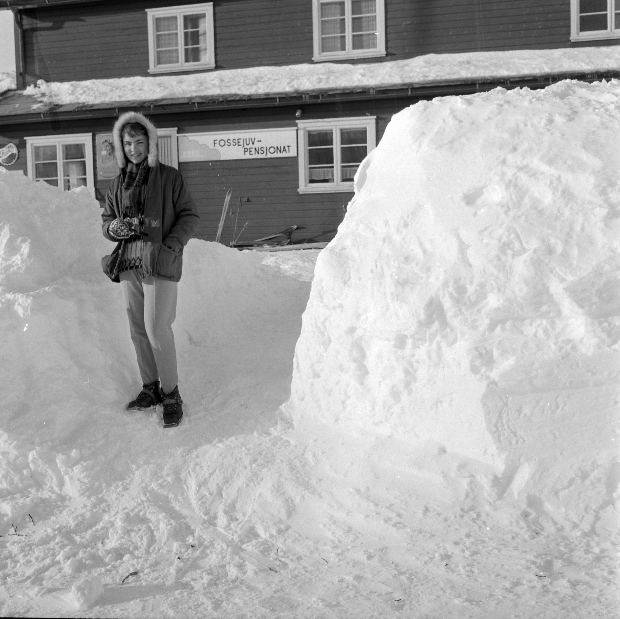 Fossejuv pensjonat